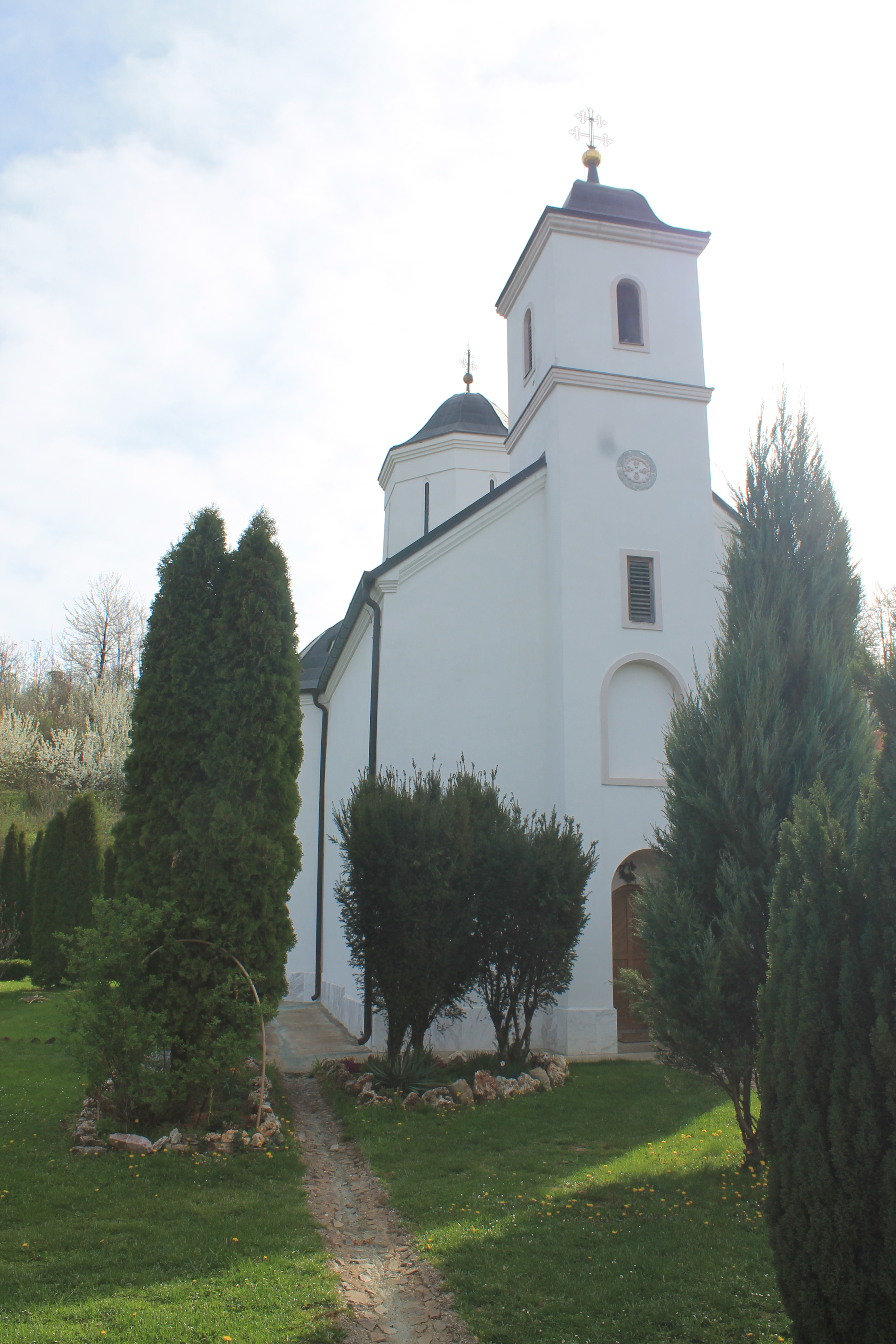 Manastir Svete Petke